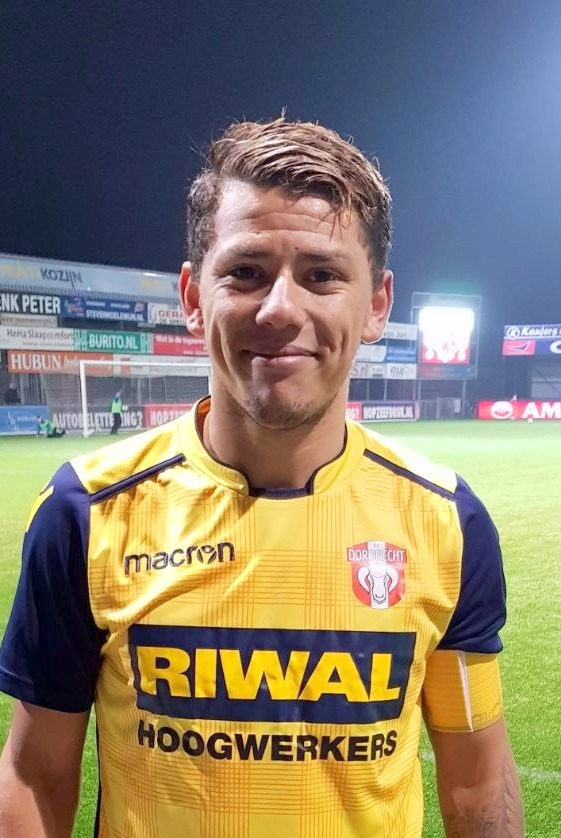 Gustavo Hamer